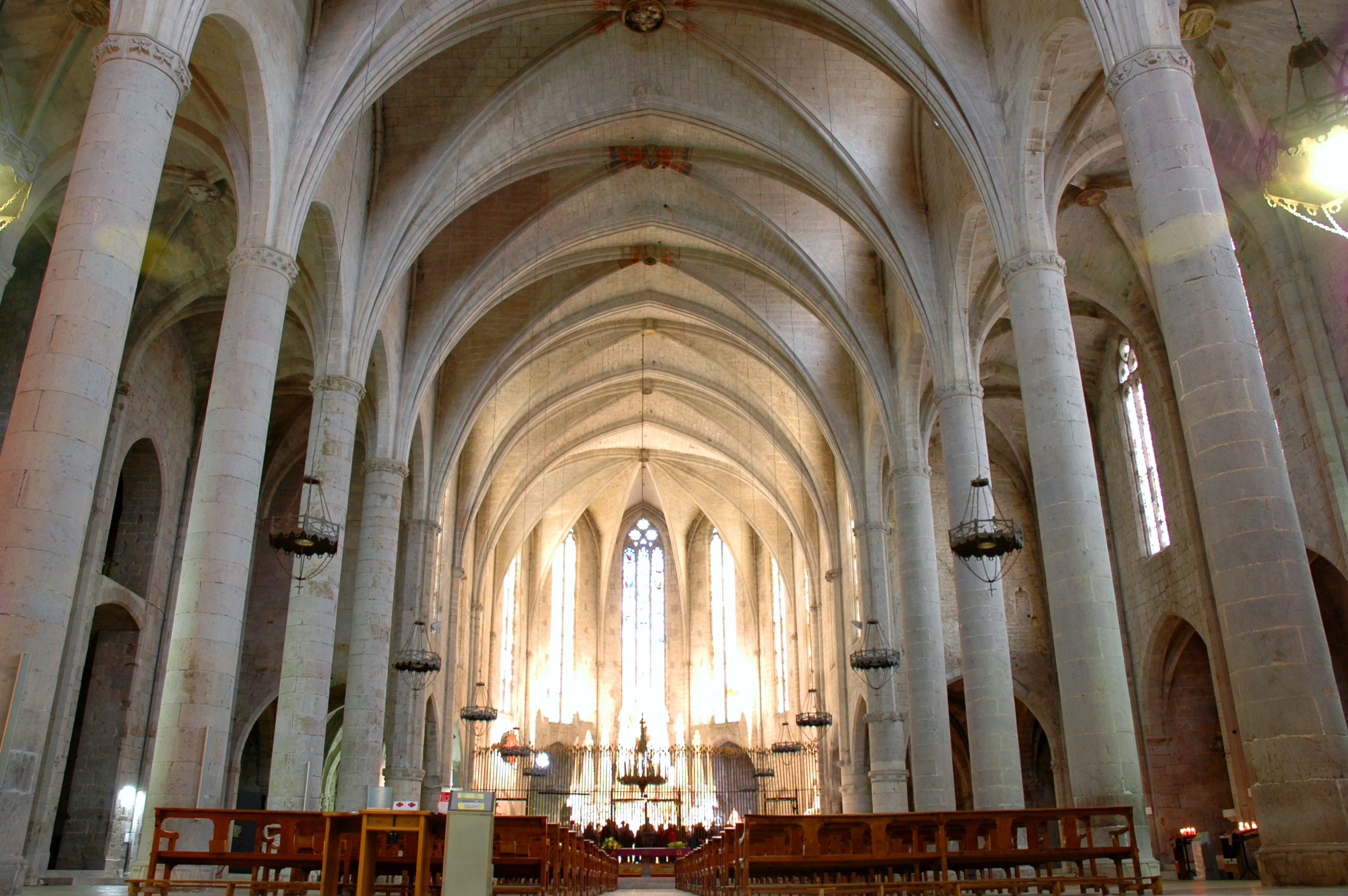 Santa Maria de Castelló d'Empúries - Interior